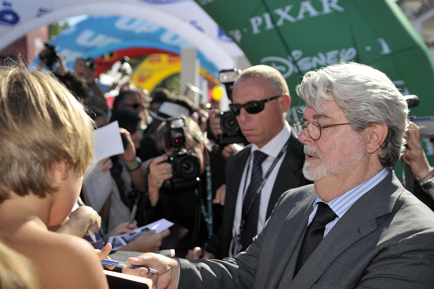 66ème Festival du Cinéma de Venise (Mostra), 5ème jour (06/09/2009) Geaorges Lucas et les réalisateurs de Pixar receoivent un Lion d'Or pour l'ensemble de leur carrière : John Lasseter (Toy Story, 1001 Pattes, Cars...), Brad Bird (Les Indestructibles, Ratatouille), Pete Docter (Monstres et Cie, Là-haut), Andrew Stanton (Le Monde de Nemo, WALL•E) et Lee Unkrich (Toy Story 2, Monstres et Cie, Le Monde de Nemo)